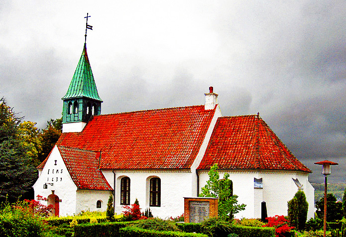 fra sydøst